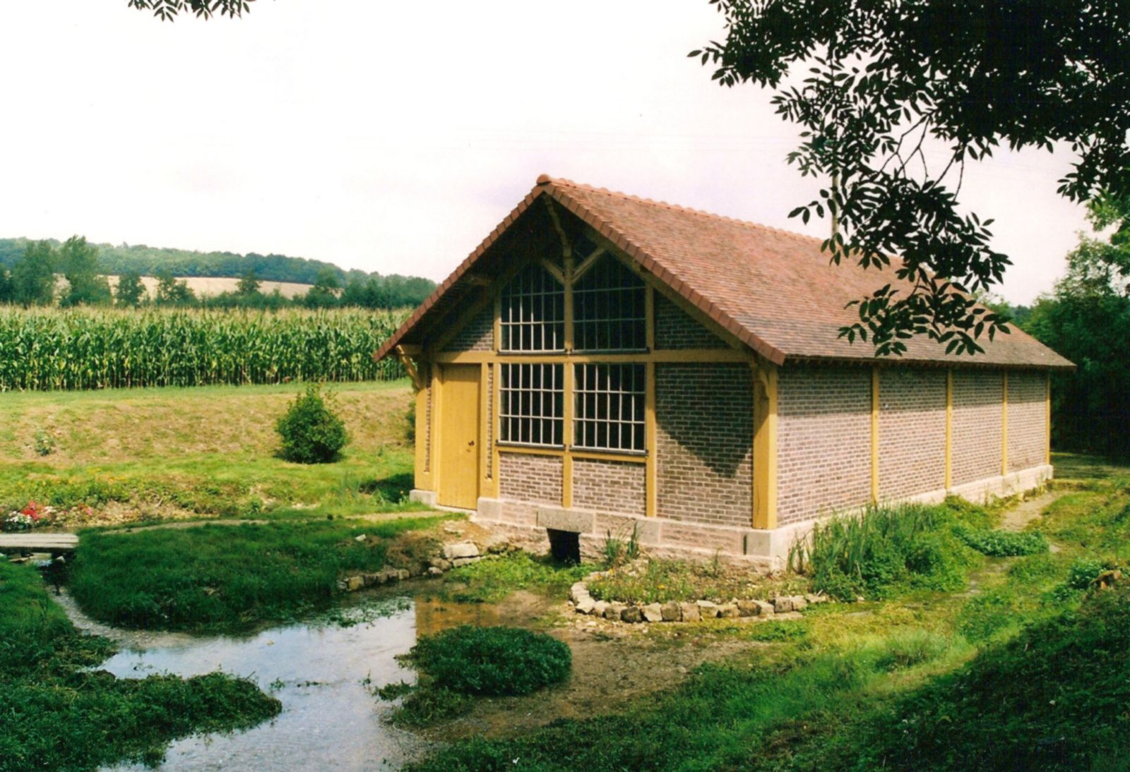 Lavoir de Chennegy (Aube, Champagne-Ardenne, France)